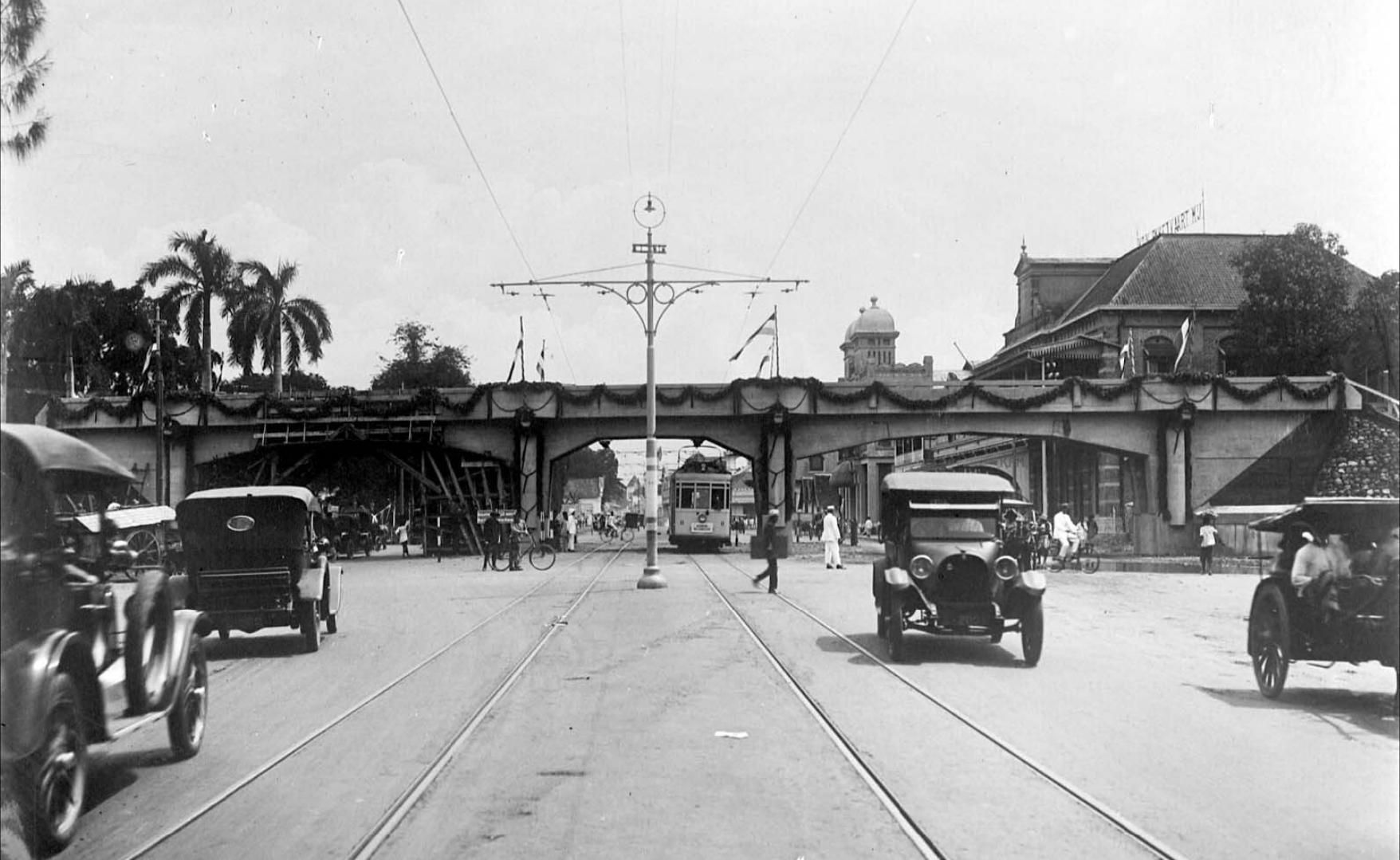 Repronegatief. Het viaduct op de Pasar Besar in Soerabaja is geopend op 28 oktober 1926. Er rijden auto's, fietsers en een geëlectrificeerde tram van de Oost-Java Stoomtram Maatschappij onderdoor